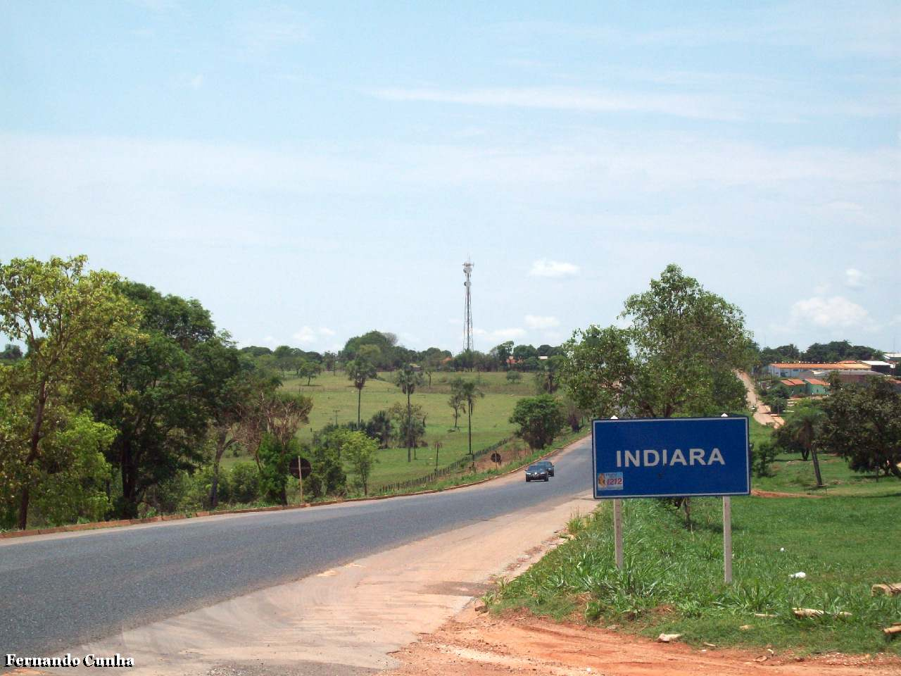 Indiara, estado de Goías.